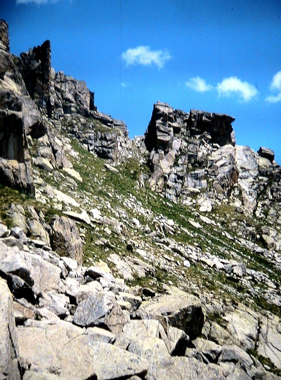 El Pas de l'Ós, una entalladura a la barrera granítica que separa l'estany de Saburó del de Mar. La Torre de Capdella (Pallars Jussà - Catalunya). Foto presa de la projecció d'una diapositiva.